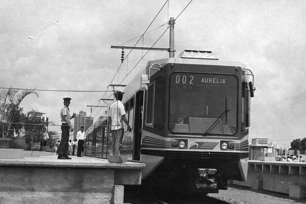 Um dos trens articulados TA-68 do VLT de Campinas, fabricado no Brasil pela Cobrasma sob supervisão da empresa belga La Brugeoise et Nivelles SA.